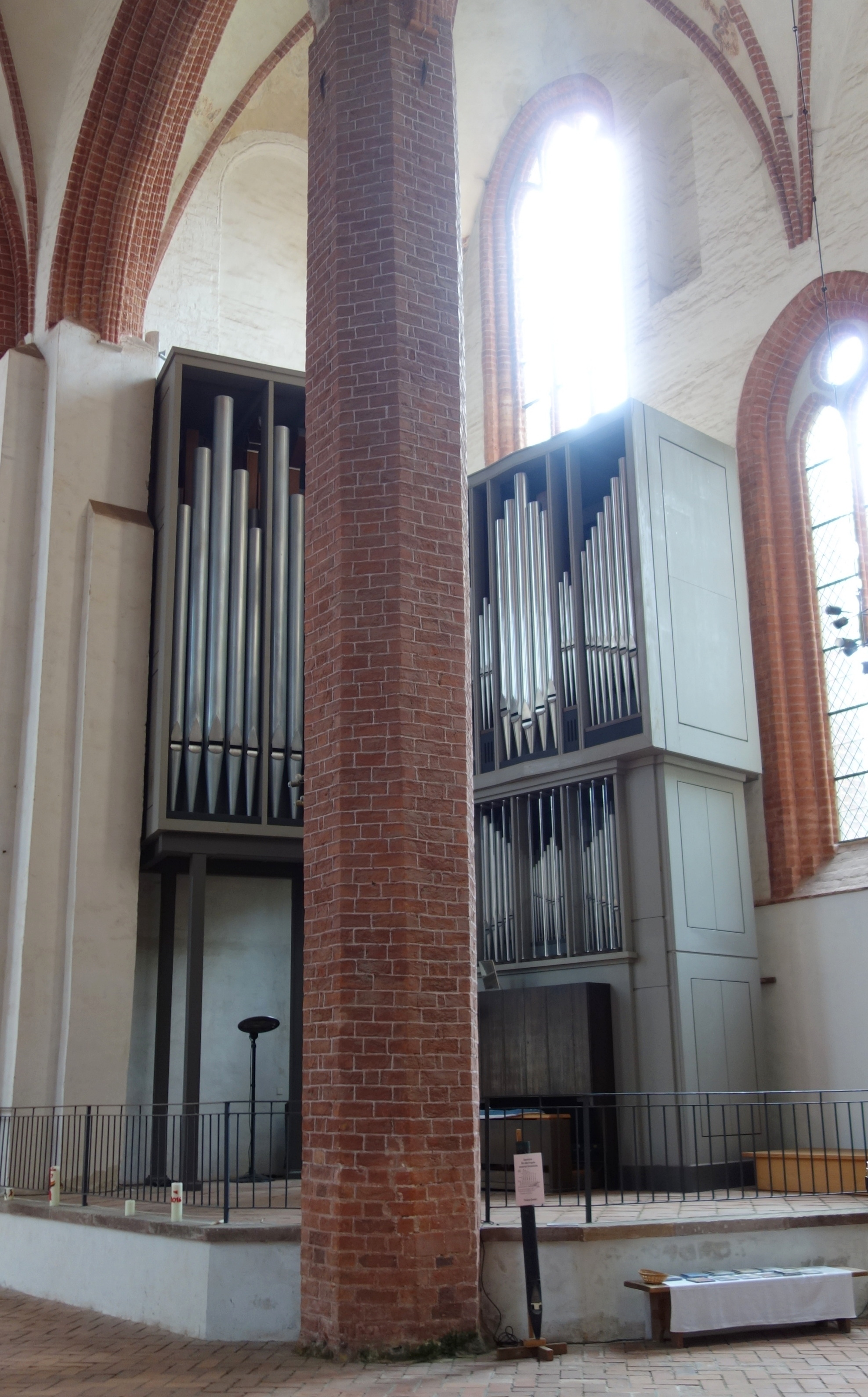 Katharinenkirche Salzwedel, Altmarkkreis Salzwedel, Sachsen-Anhalt, Deutschland